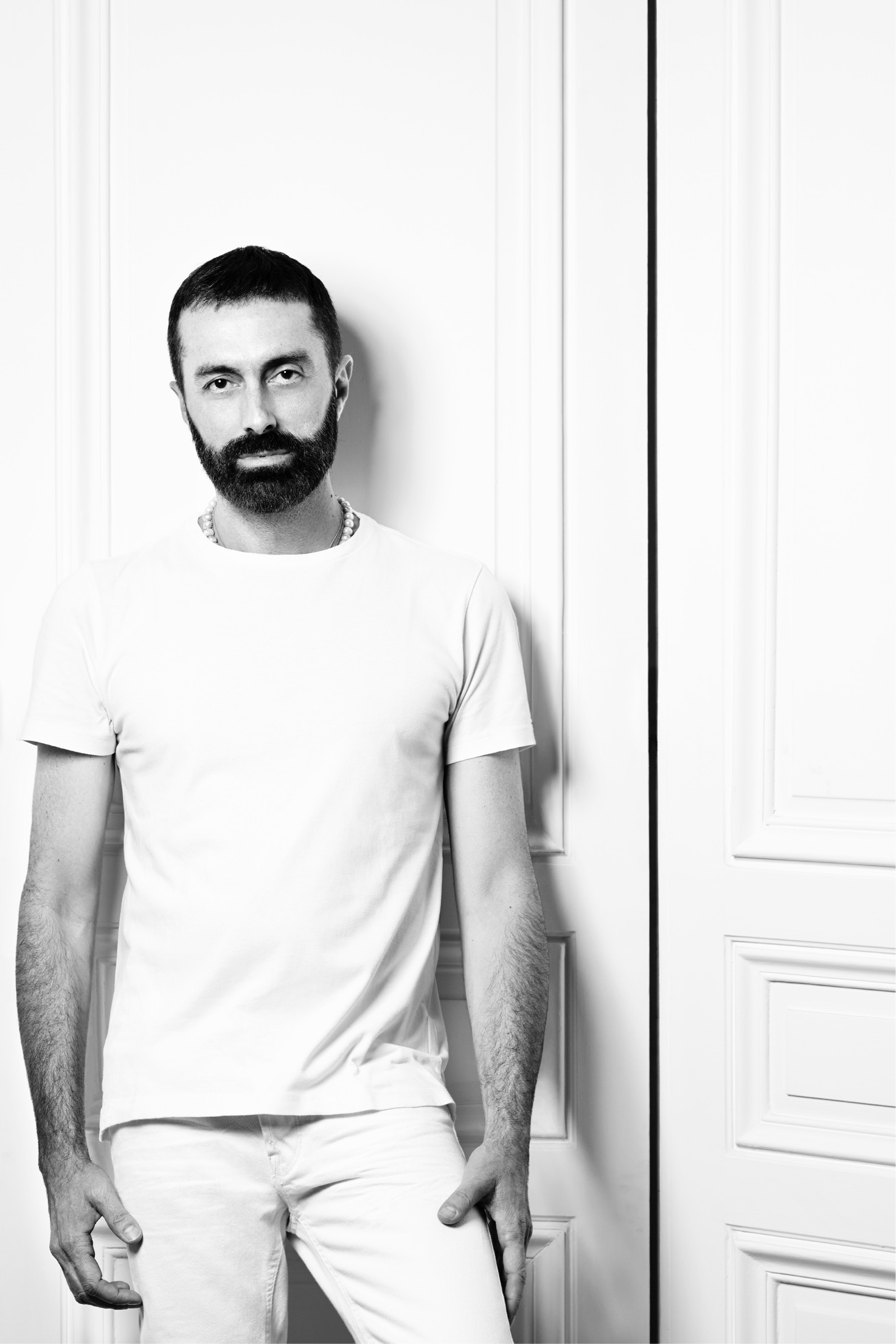 Giambattista Valli